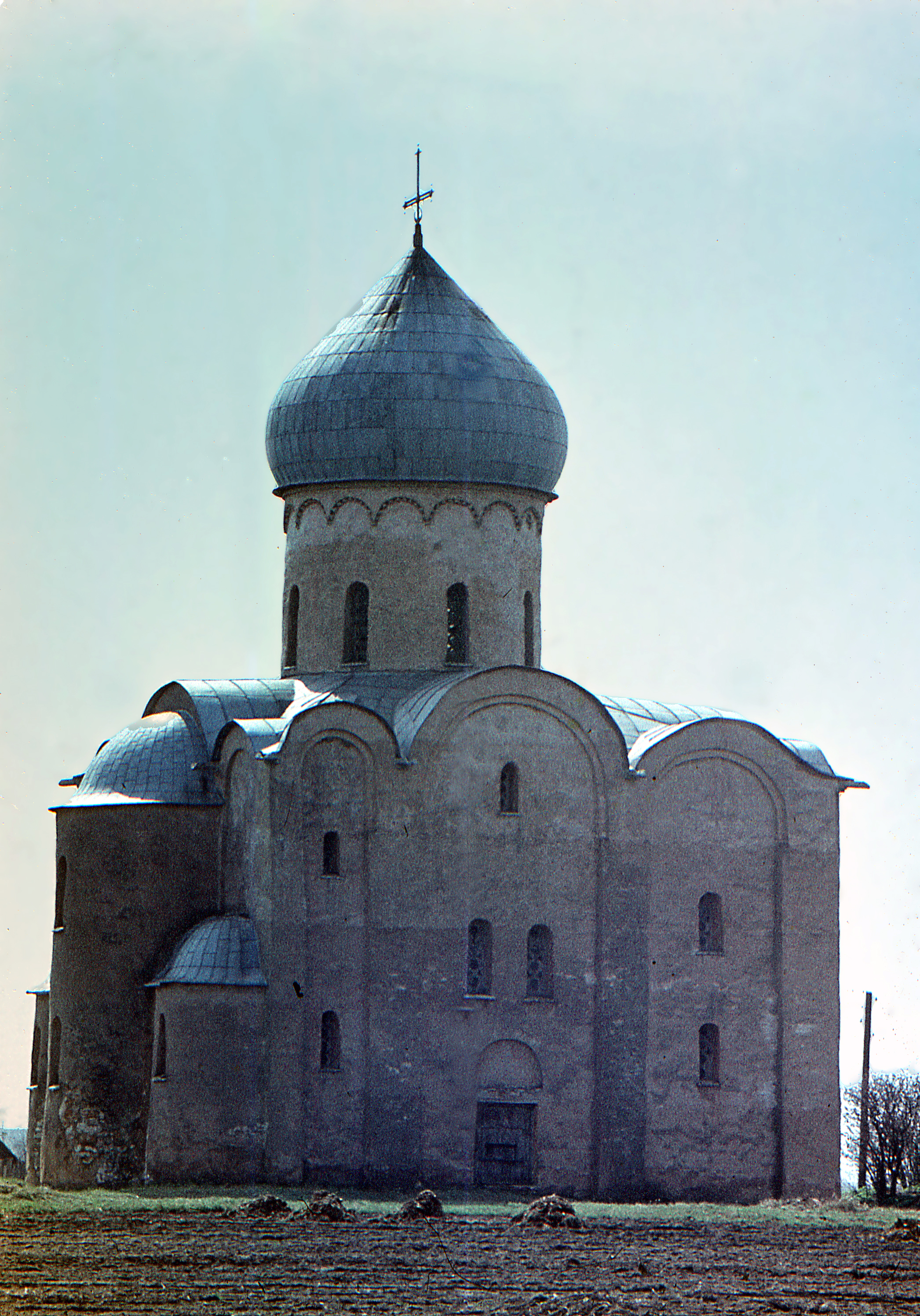 Церковь Нередица в Новгороде